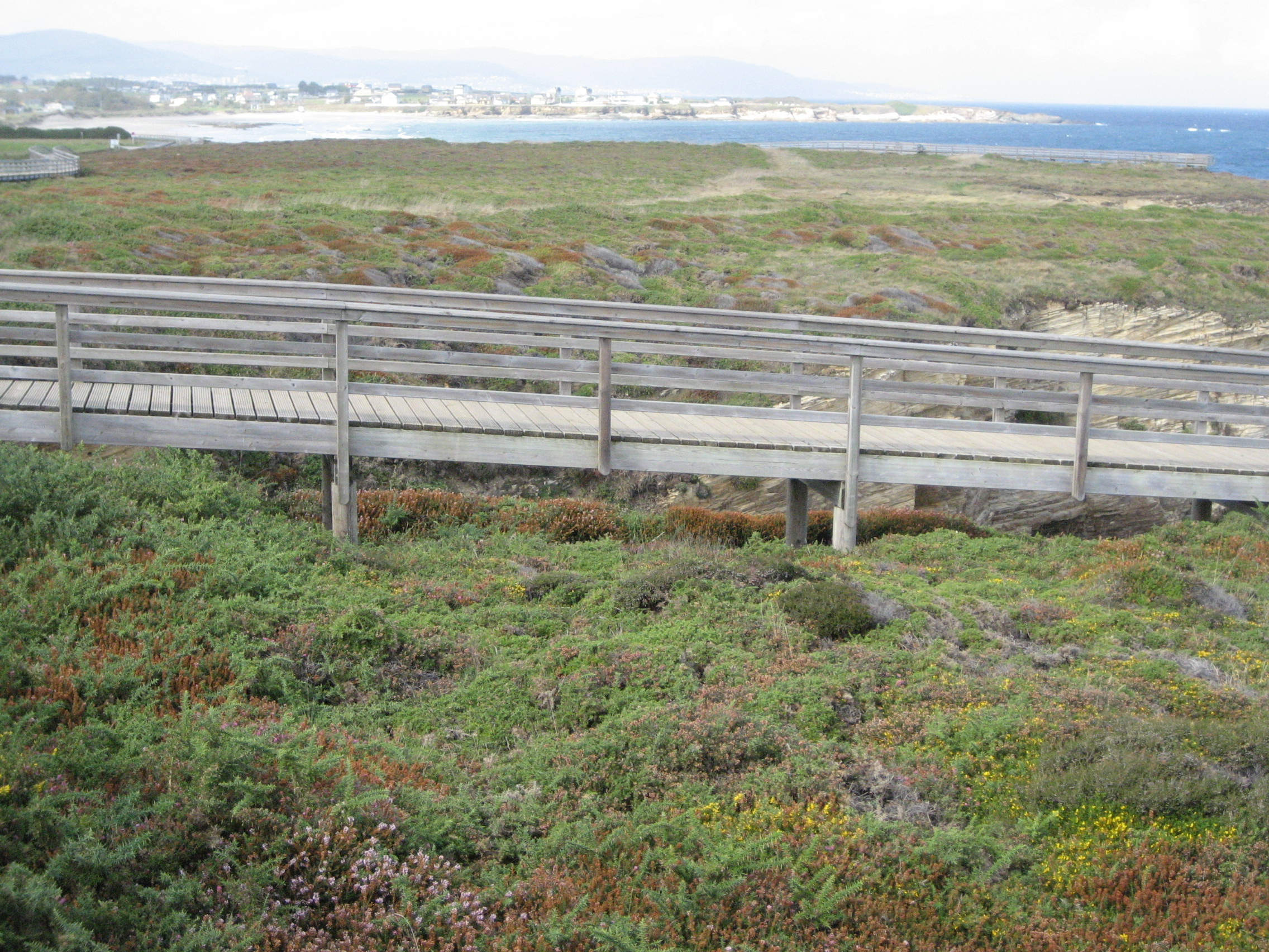 Acceso a la Playa de las Catedrales This is a photography of a Special Area of Conservation in Spain with the ID: ES1120005. Natura2000 entry, EEA entry